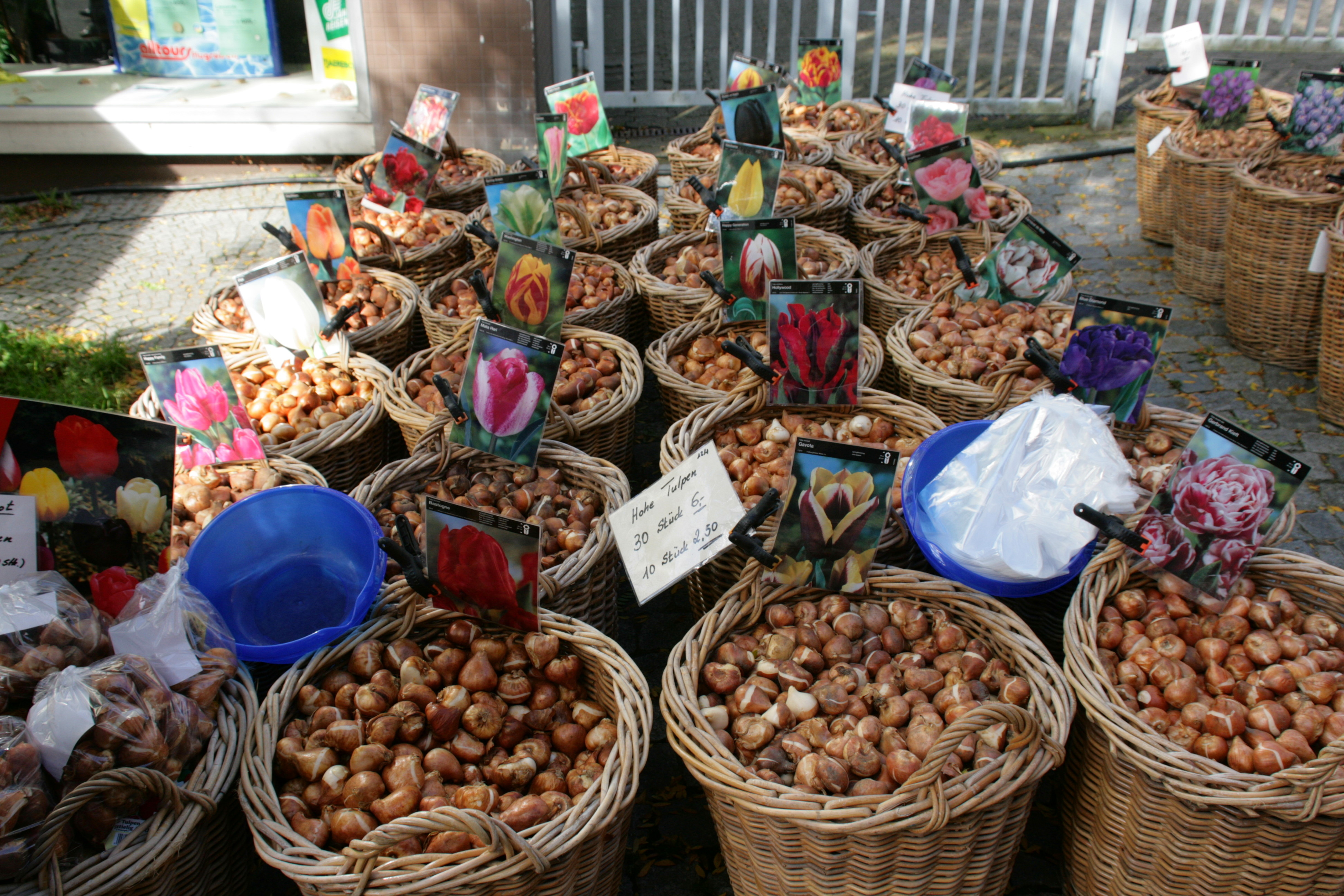 Bauernmarkt in Remscheid-Lüttringhausen